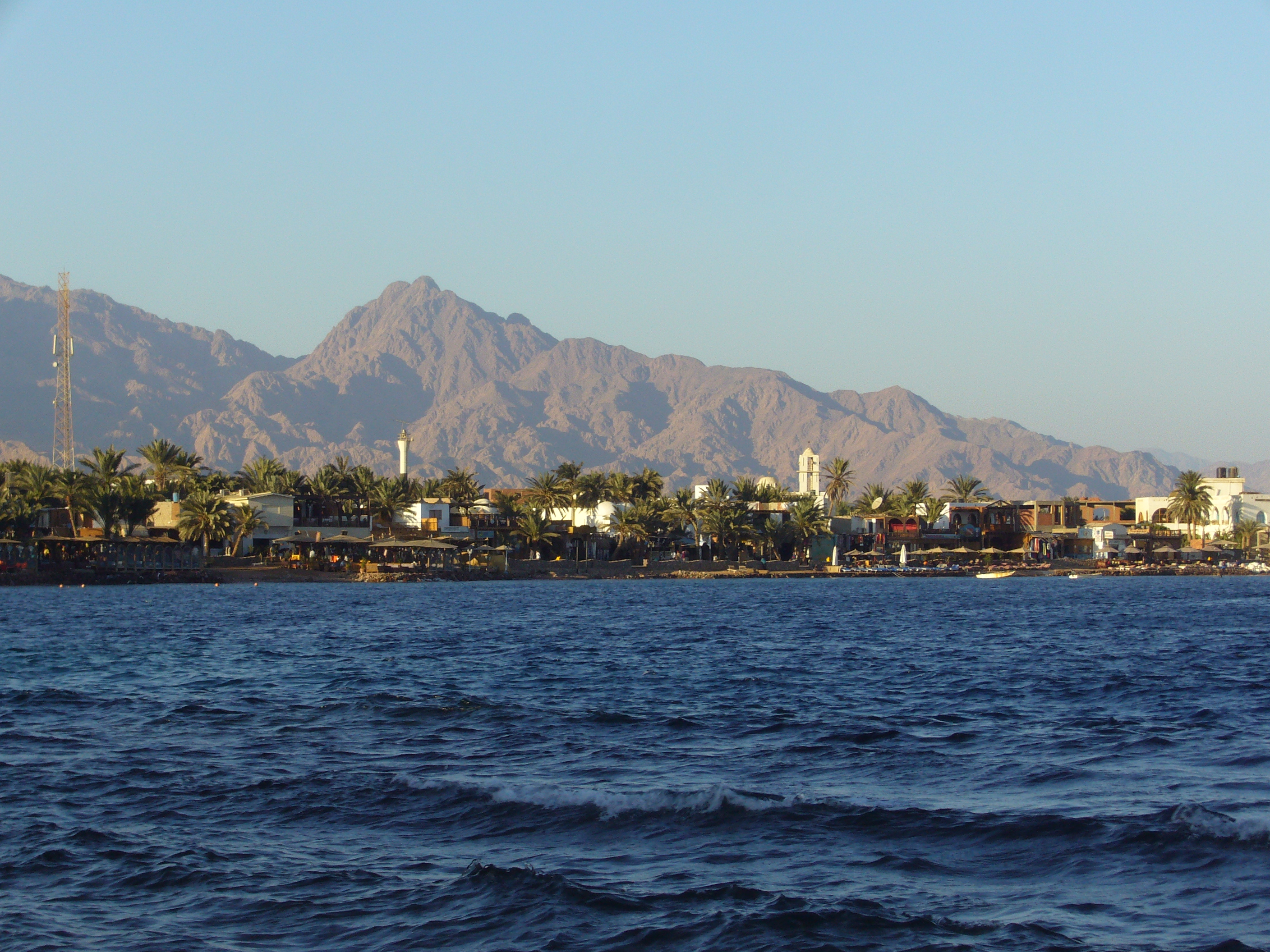 Sinai Taba